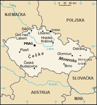 Ovu sam sliku napravio na temelju CIA-ine slike u javnom vlasniÅ¡tvu. --Zmaj 16:32, 1. lipanj 2007. (CEST)